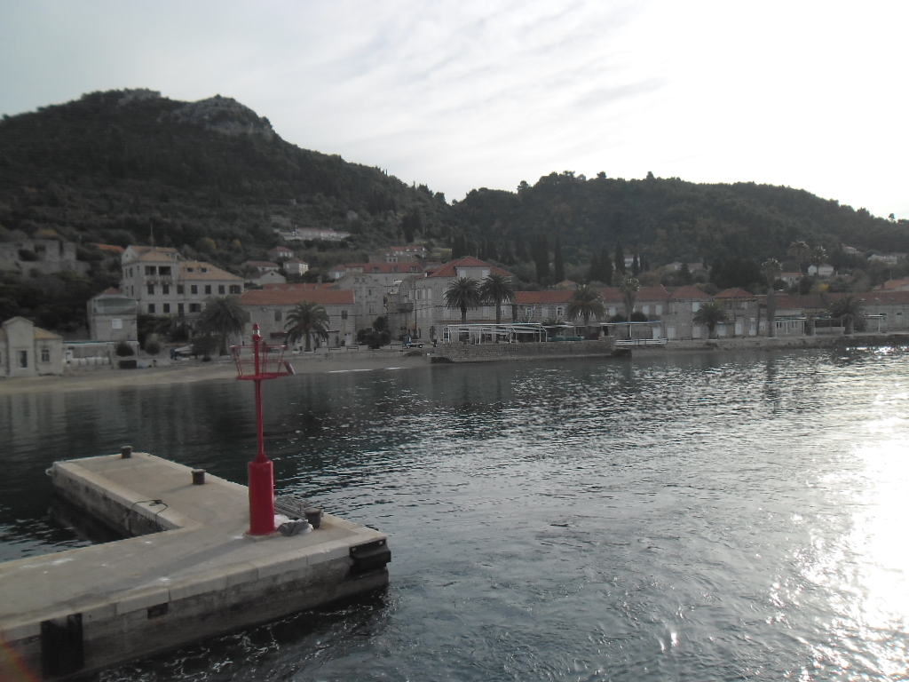 otok Lopud 9. prosinca 2013.